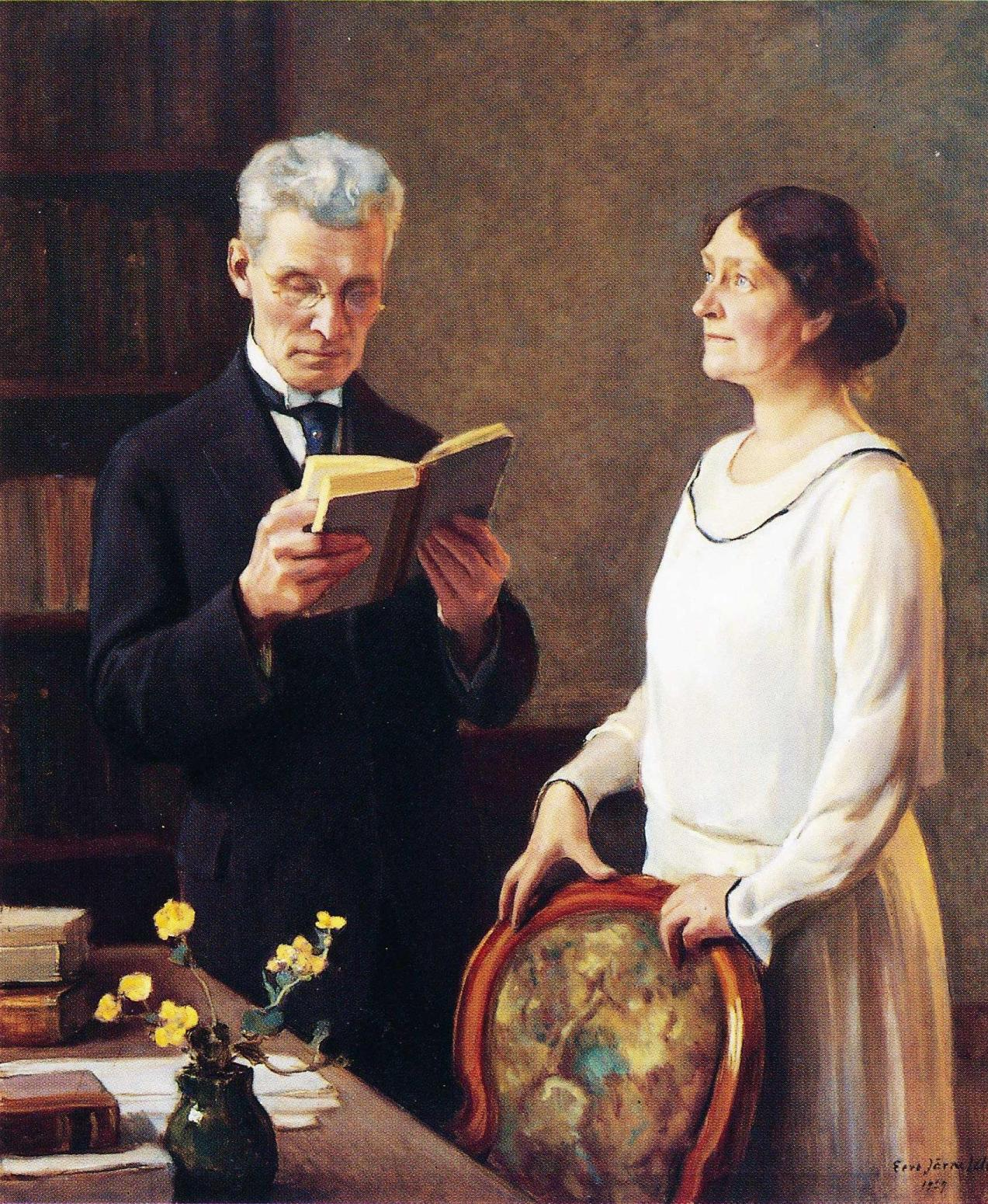 Slaavilaisen filologian professori Jooseppi Julius Mikkola (1866–1946) ja hänen puolisonsa, kirjailija Maila Talvio (1871–1951). Helsingin yliopiston Satakuntalaisen osakunnan tilaama muotokuva.